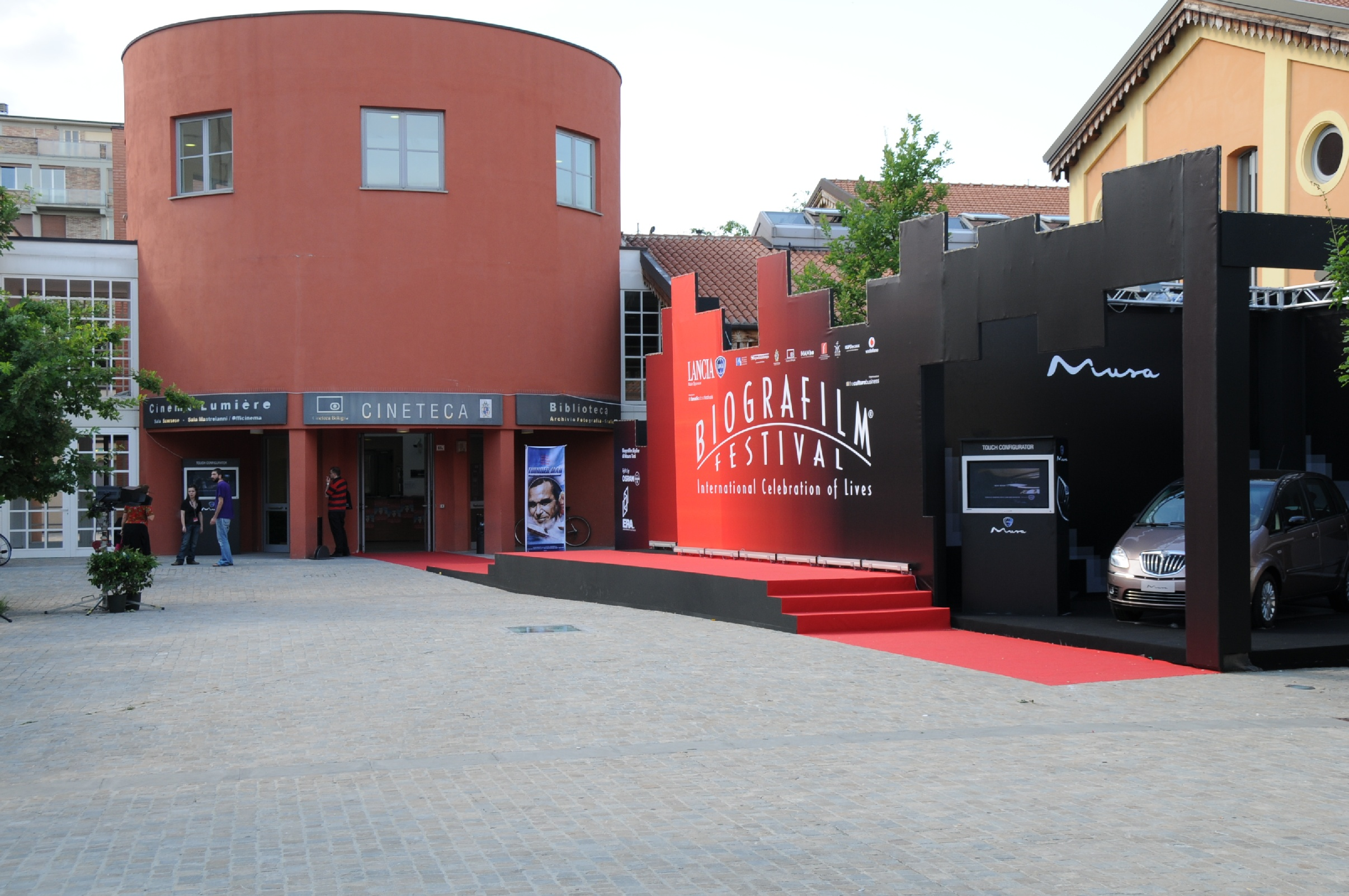 Biografilm 2008 - Bologna Contents 1 source 2 date 3 author 4 permission 5 Licensing 6 Original upload log source Self made date 16 giugno 2008 author Utente:Cassinam permission Category:Biografilm2008